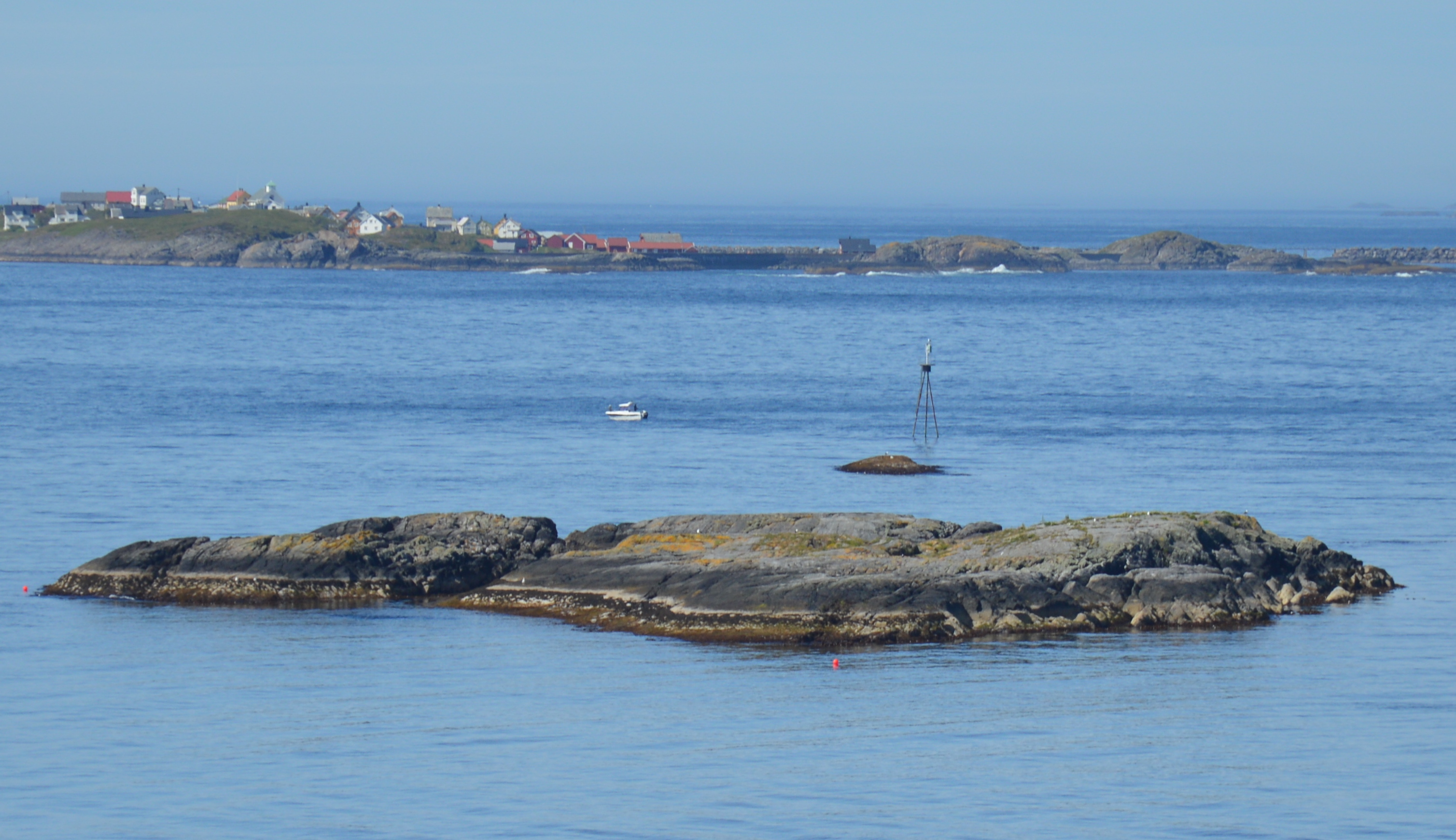 Håskjæret